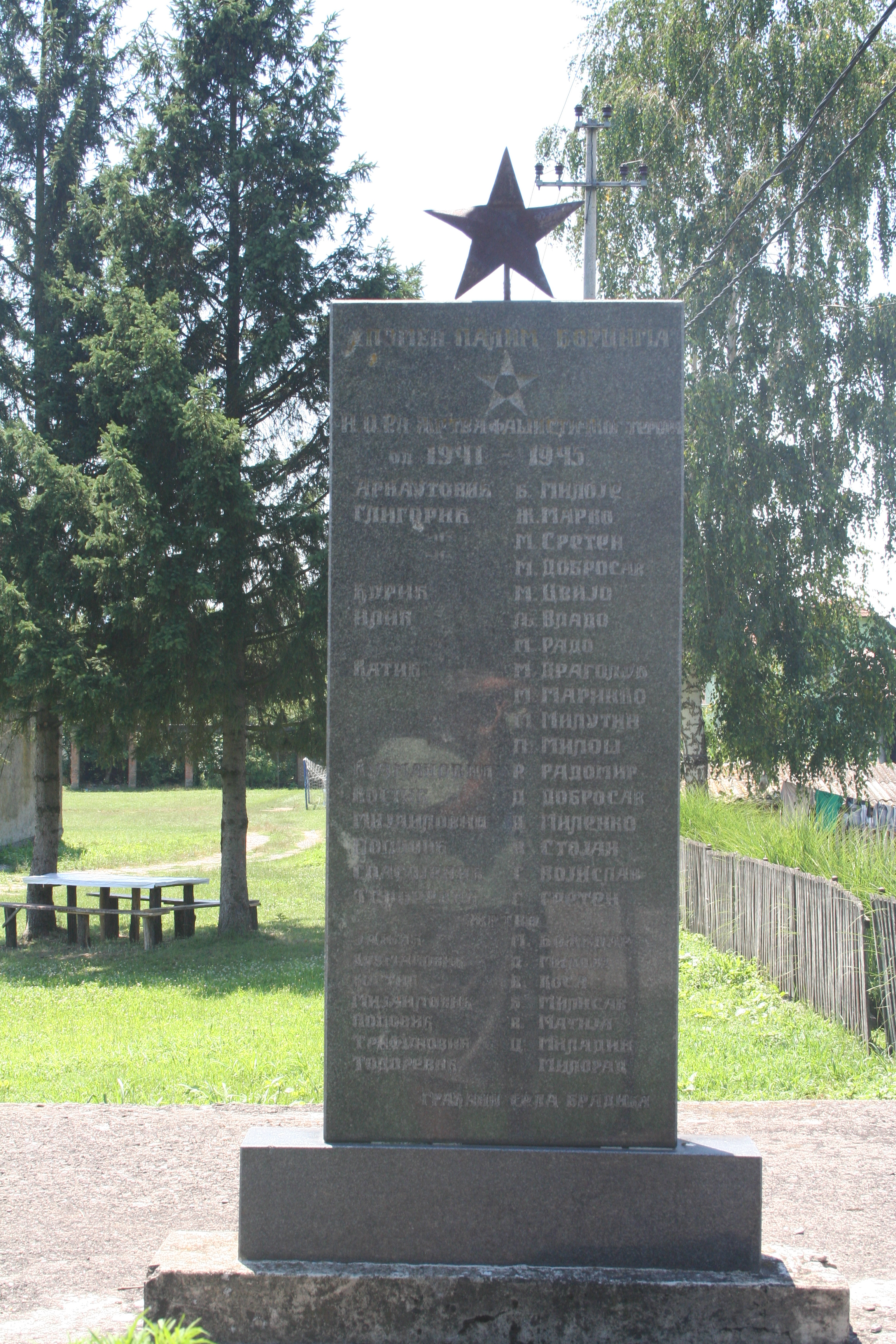 Spomenik NOB-a, Bradić